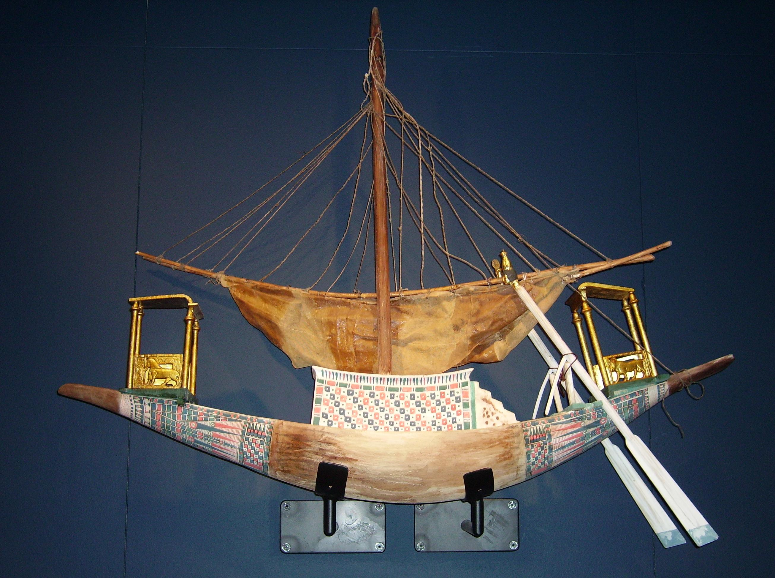 Model lodi z Tutanchamonovy hrobky; replika z výstavy Tutanchamon - jeho hrob a poklady